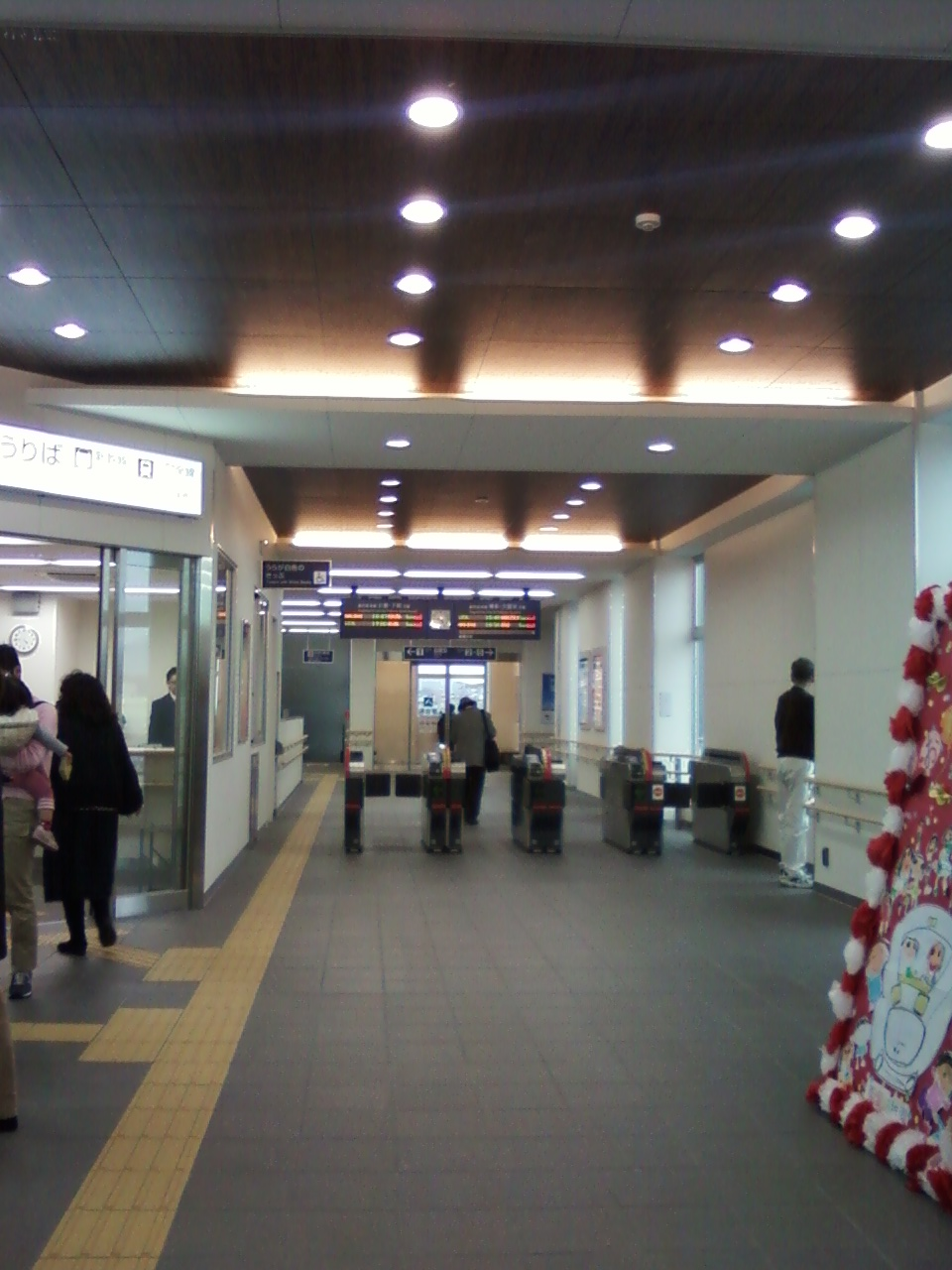 福間駅 改札口